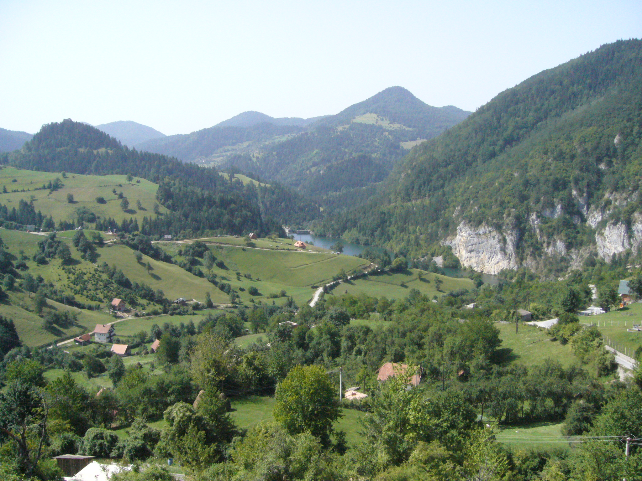 Tara Mountain, Serbia